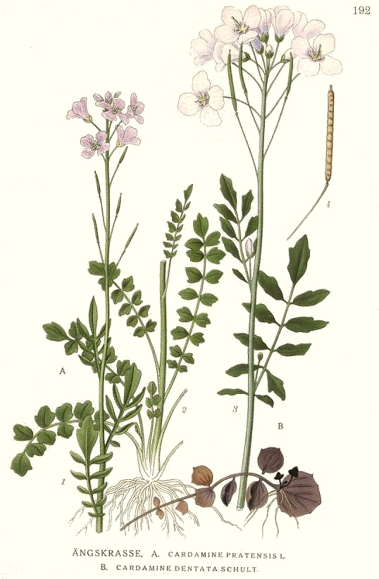 A. Cardamine pratensis L., B. Cardamine pratensis subsp. paludosa Original Description Ängskrasse A. Cardamine pratensis L. B. Cardamine dentata Schult.